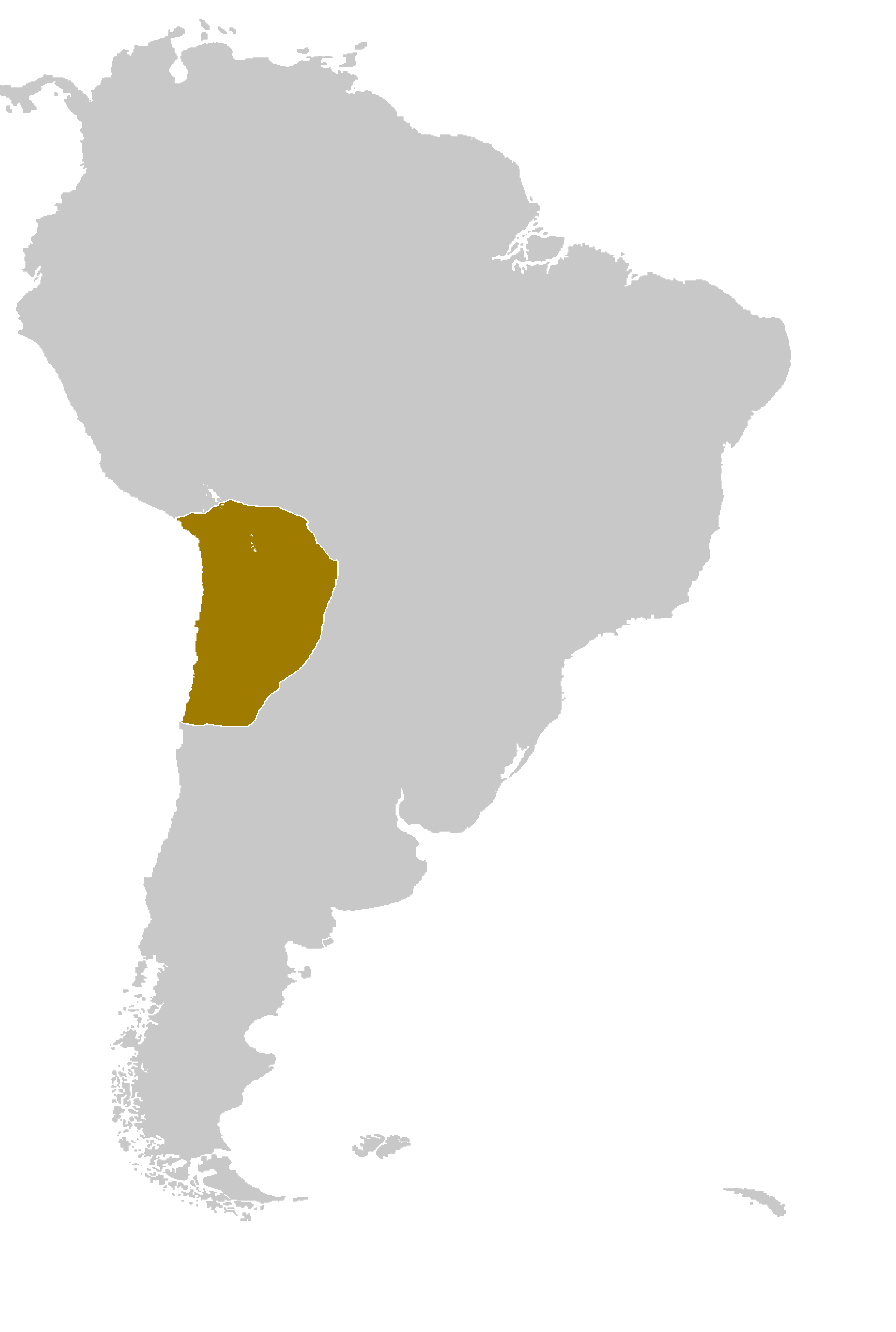 Pueblo Kolla